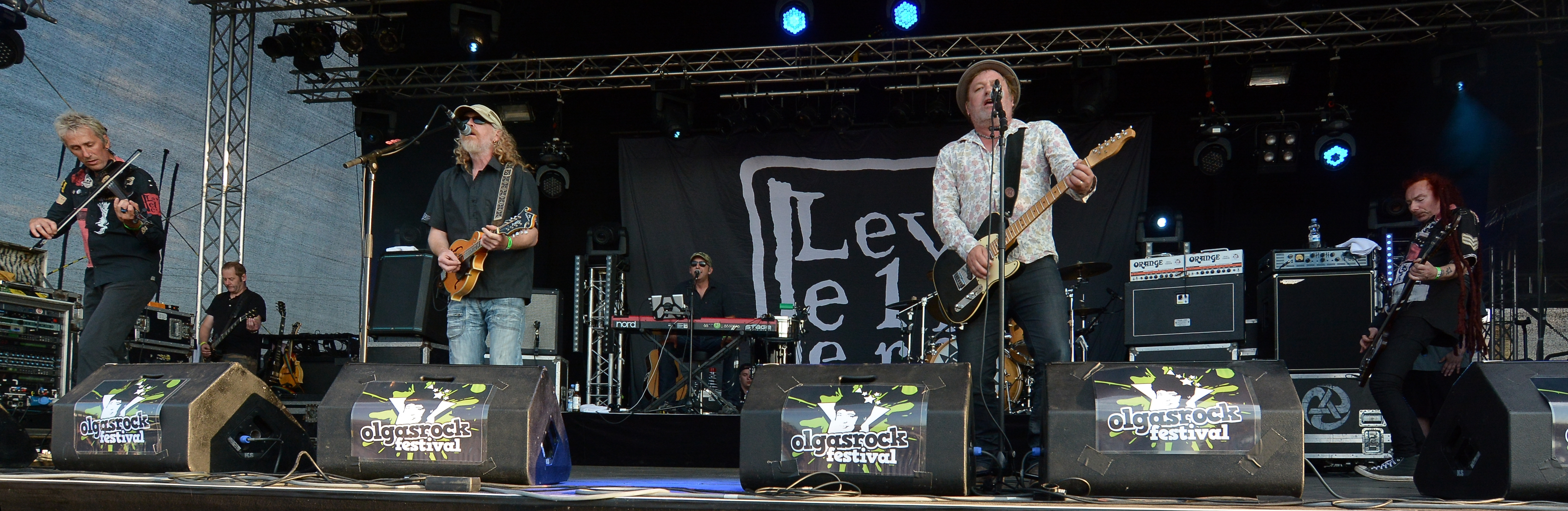 Levellers bei Olgas Rock 2015